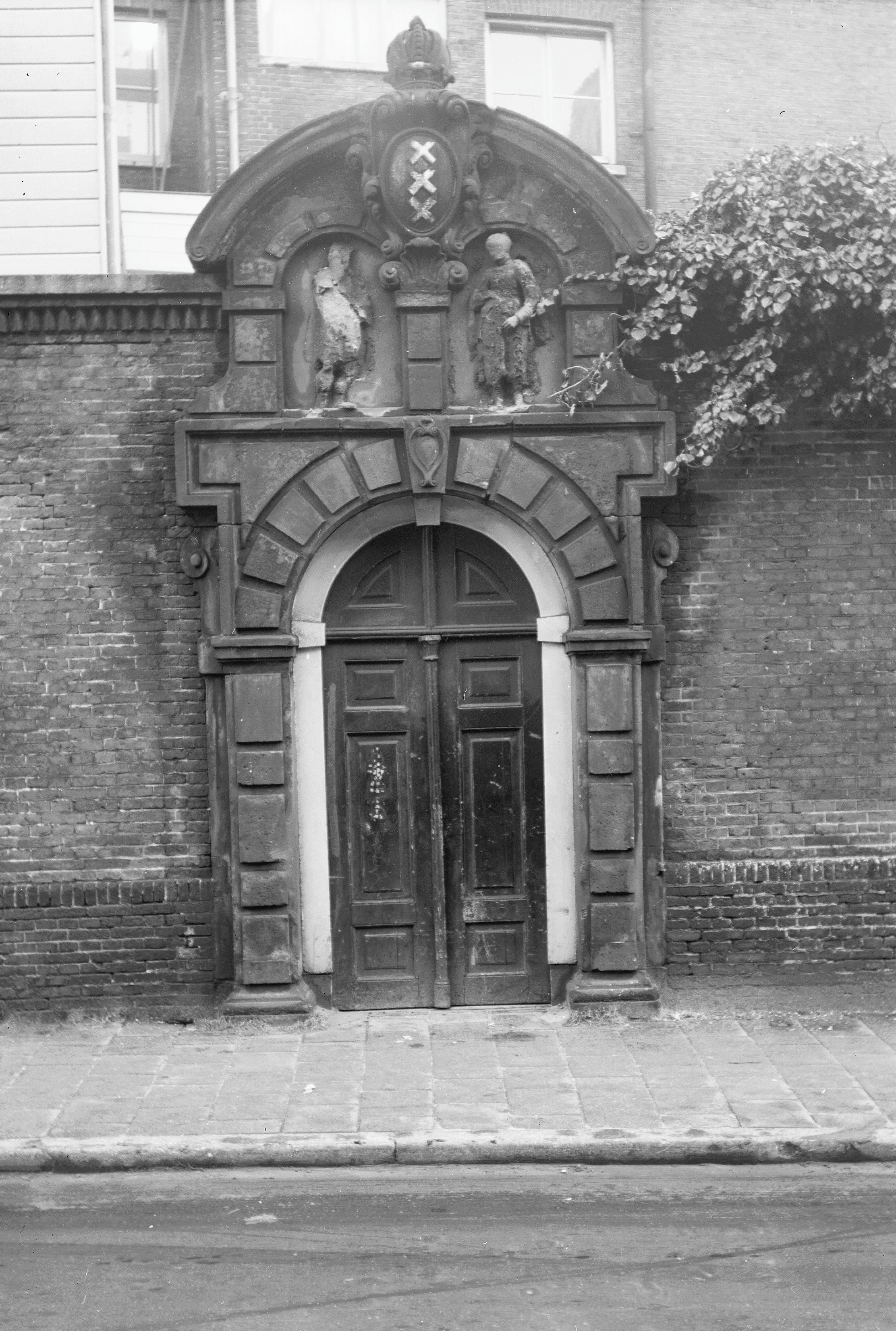 Lazarussteeg; vervallen poort, aanzicht; hele steeg is gesloopt; poortje tot Leprozenhuis